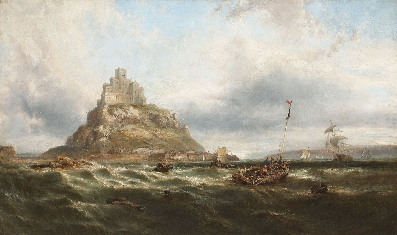 St Michael's Mount (Cornwall). Signiert unten links: James Webb. Öl auf Leinwand. 76,5 x 127,5 cm.